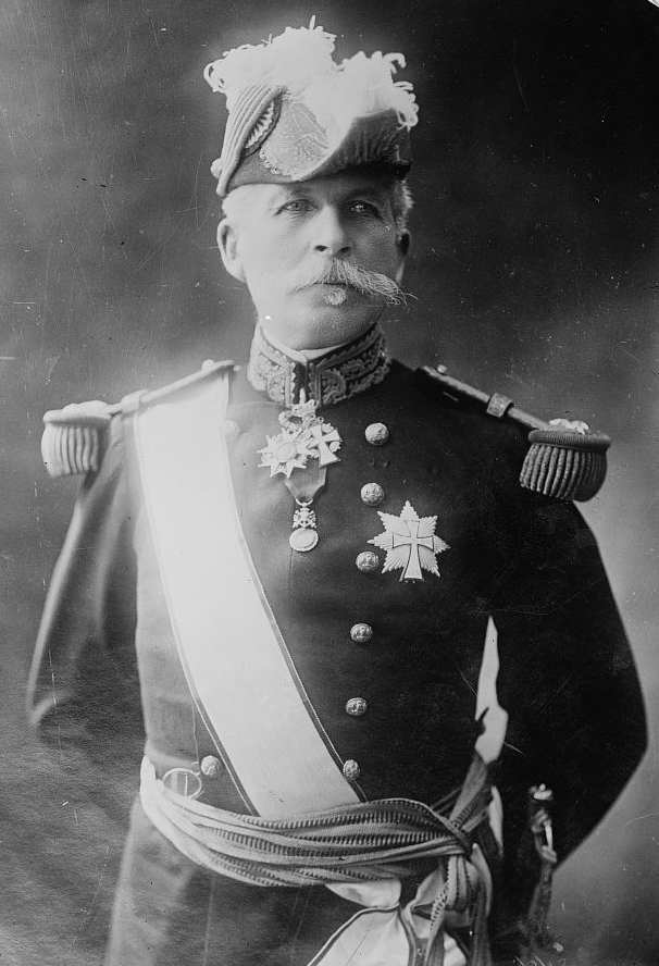 French general Albert d'Amade (1856-1941)